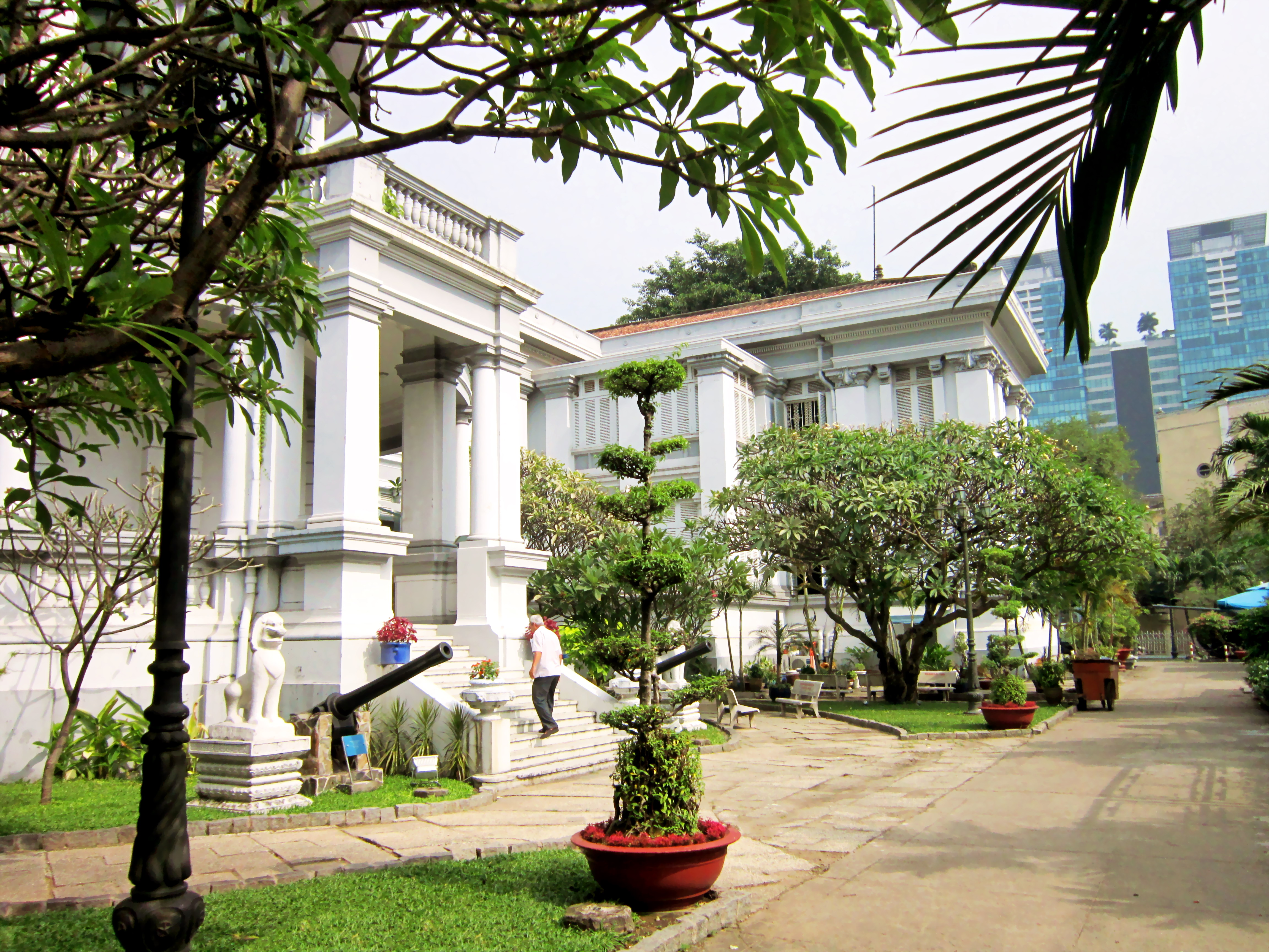 Mặt sau của Bảo tàng Thành phố Hồ Chí Minh, Việt Nam.